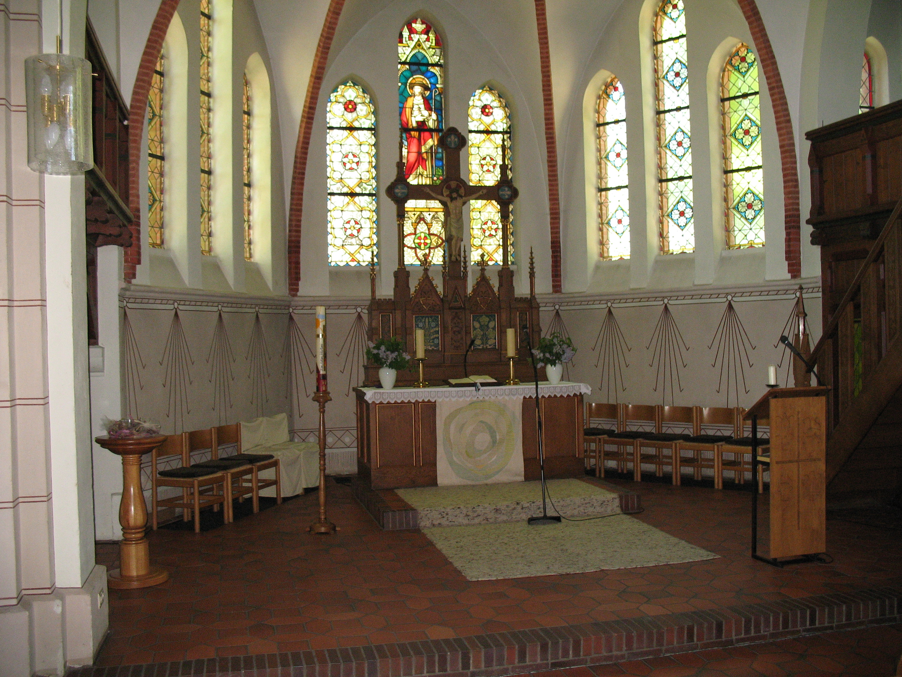 Münkeboe (Gemeinde Südbrookmerland, Kreis Aurich, Ostfriesland, Niedersachsen, Deutschland), Evangelisch-lutherische Kirche Zum Guten Hirten (1899/1900 erbaut), Ausstattung der Bauzeit (Information vgl. Dehio: Bremen/Niedersachsen, München 1992)